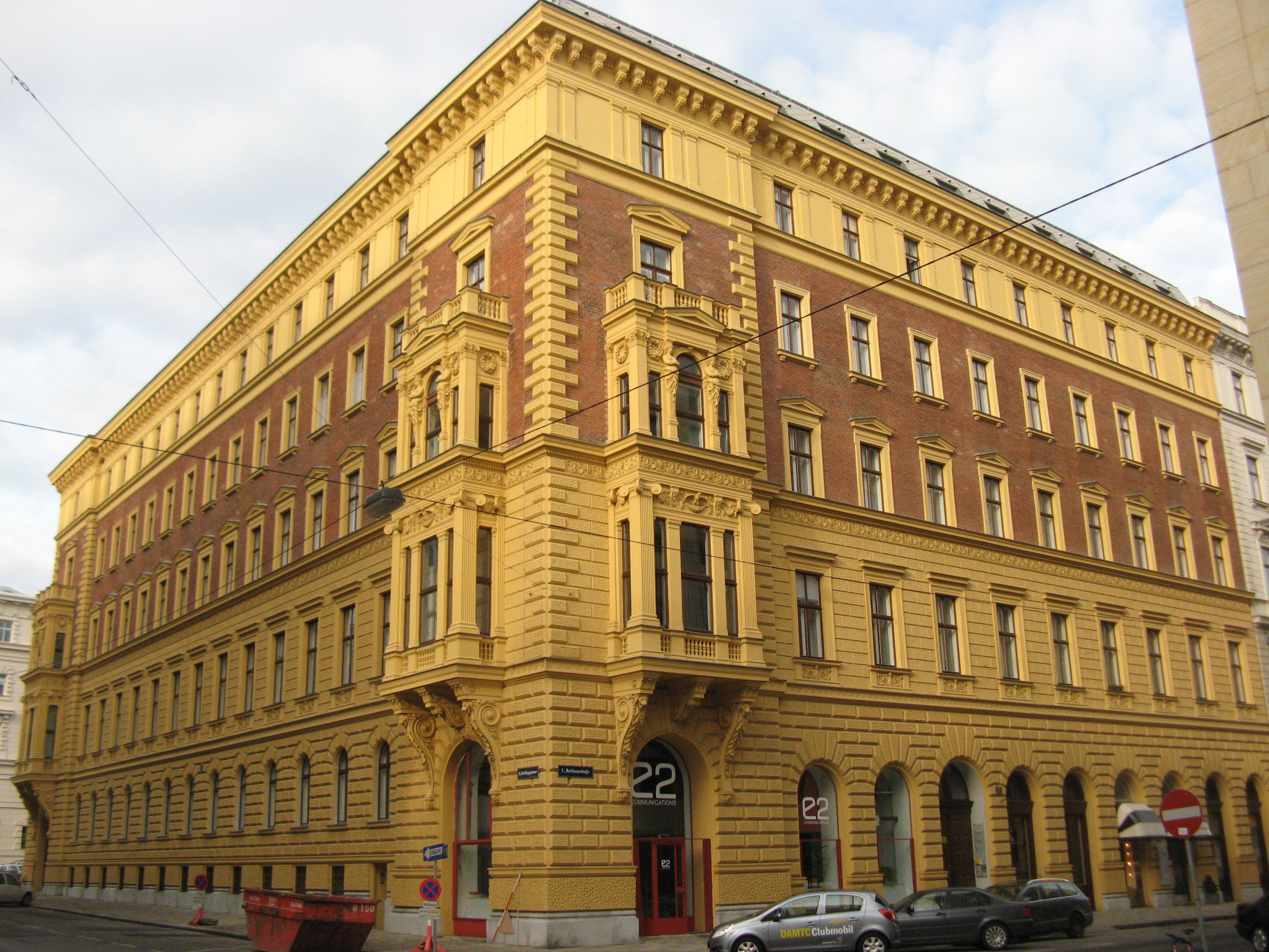 Haus (1881-82) von Ludwig Richter, Liebiggasse 8, Wien-Innere Stadt